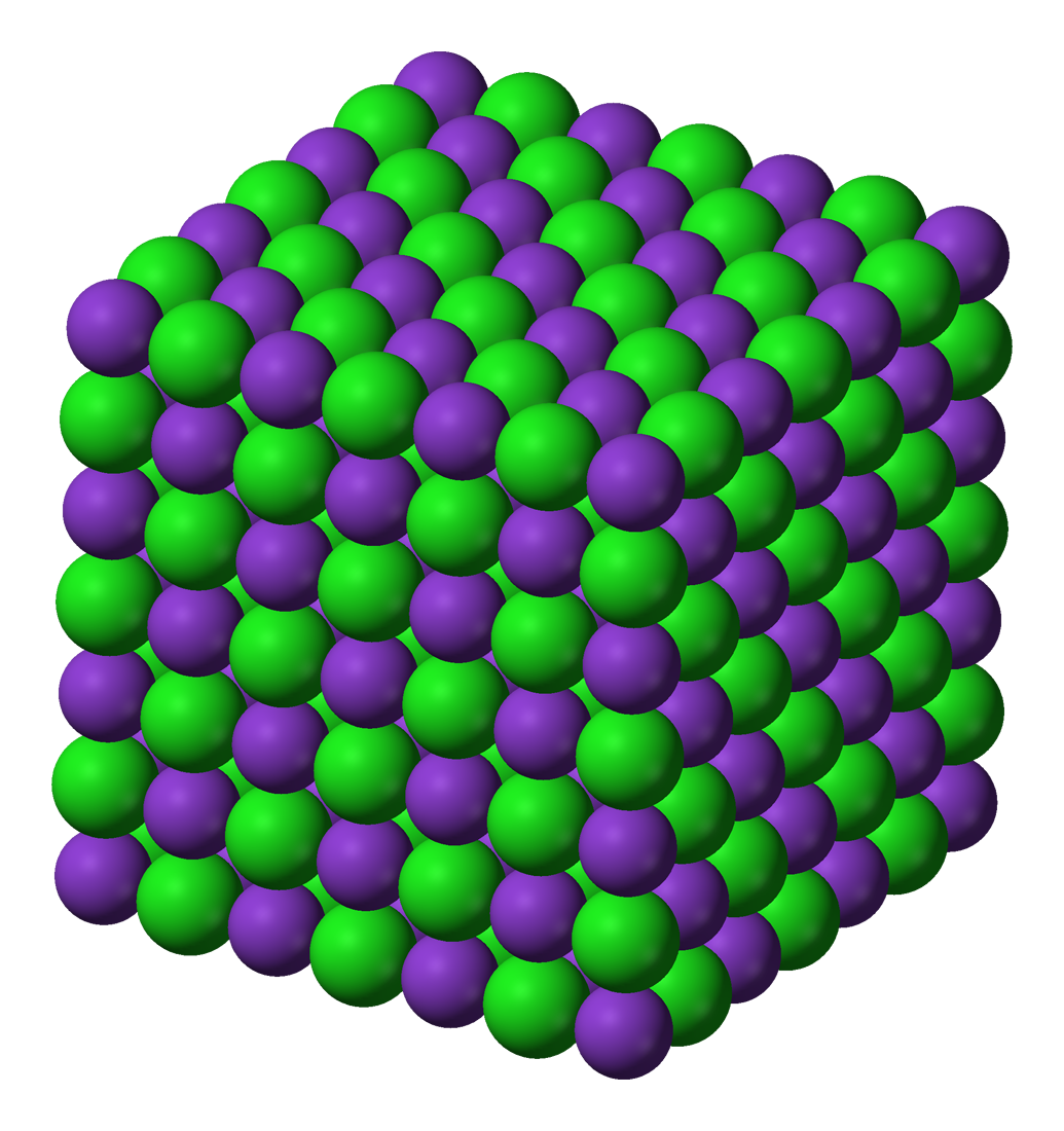 Lattice model of potassium chloride.